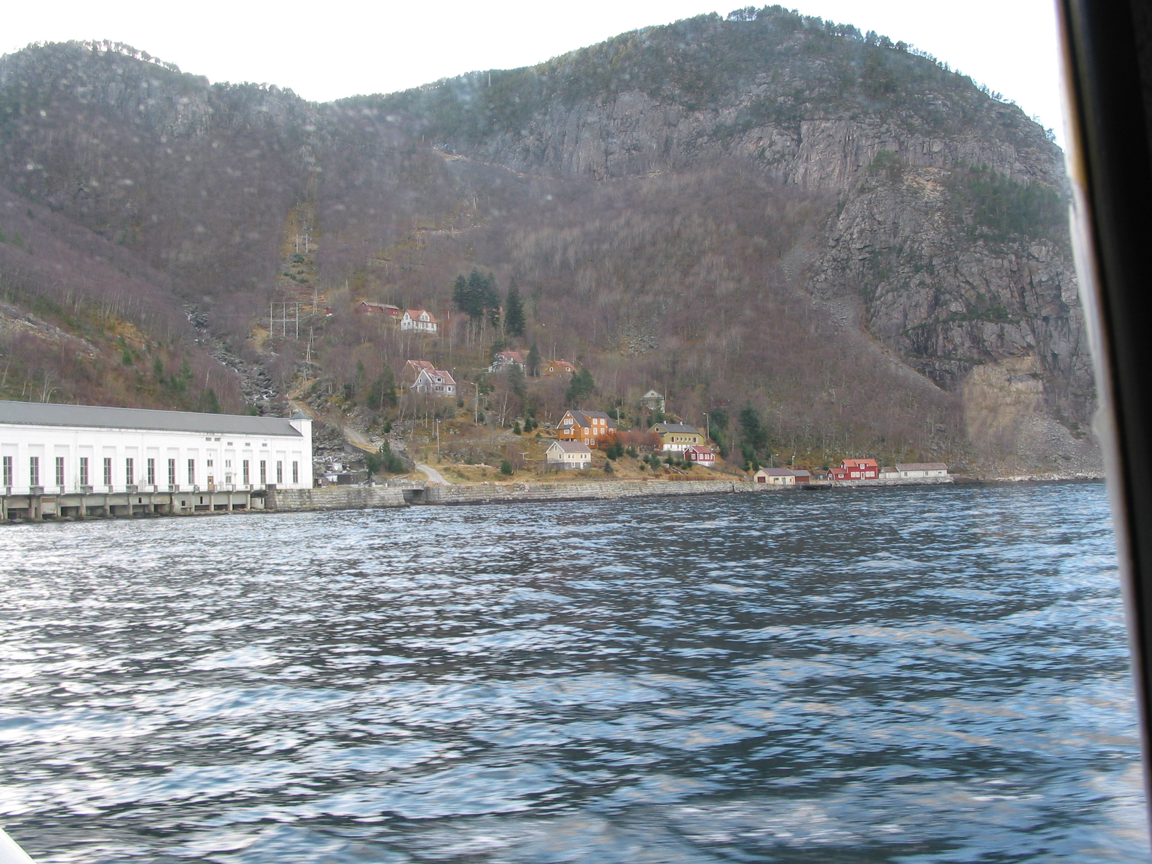 Flørli sett fra båt. Flørli ligger i Lysefjorden (Forsand kommune, norge). Til venstre i bilde ser vi kraftverket. Det nye kraftverket, som brukes i dag, er utenfor venstre kant av bilde.